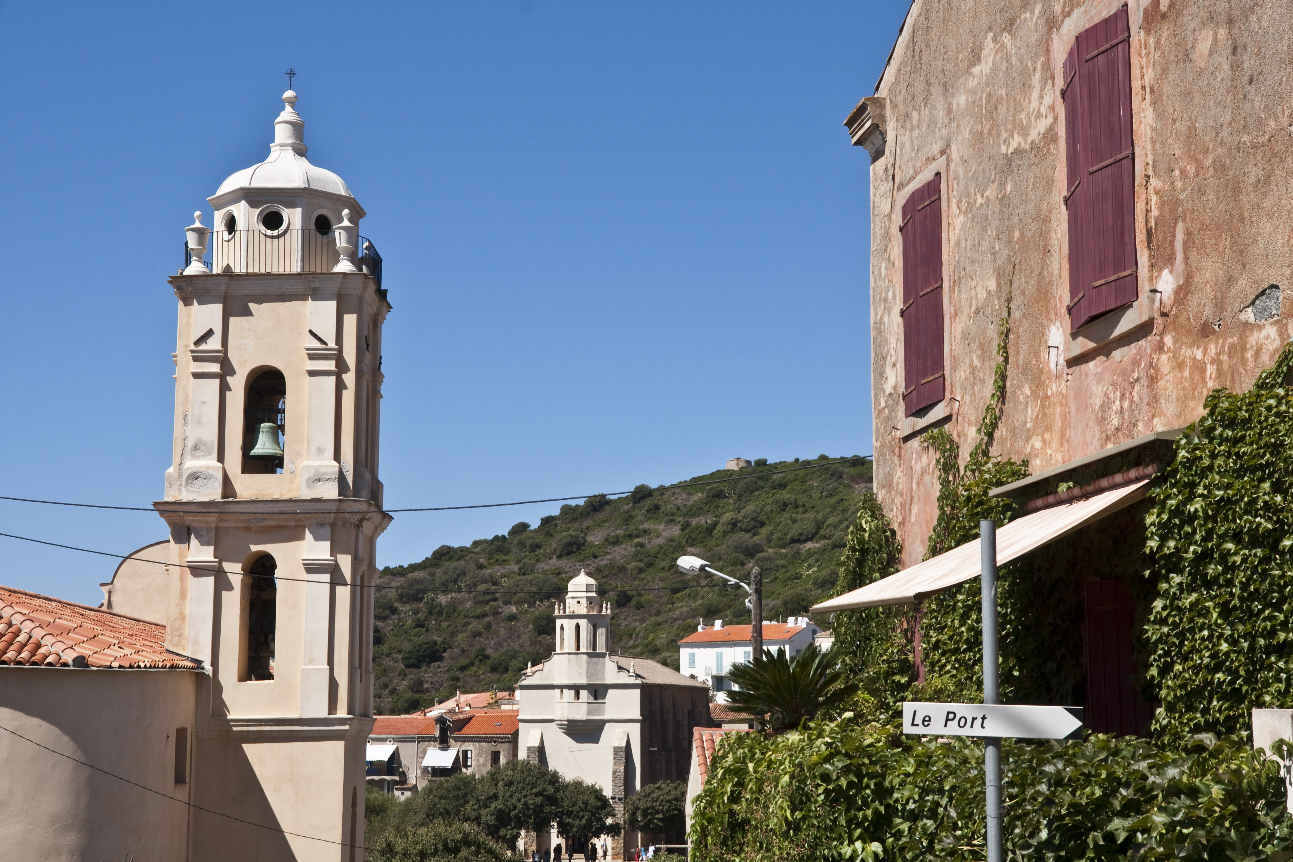 Corse, Cargèse, vue des deux églises de la ville